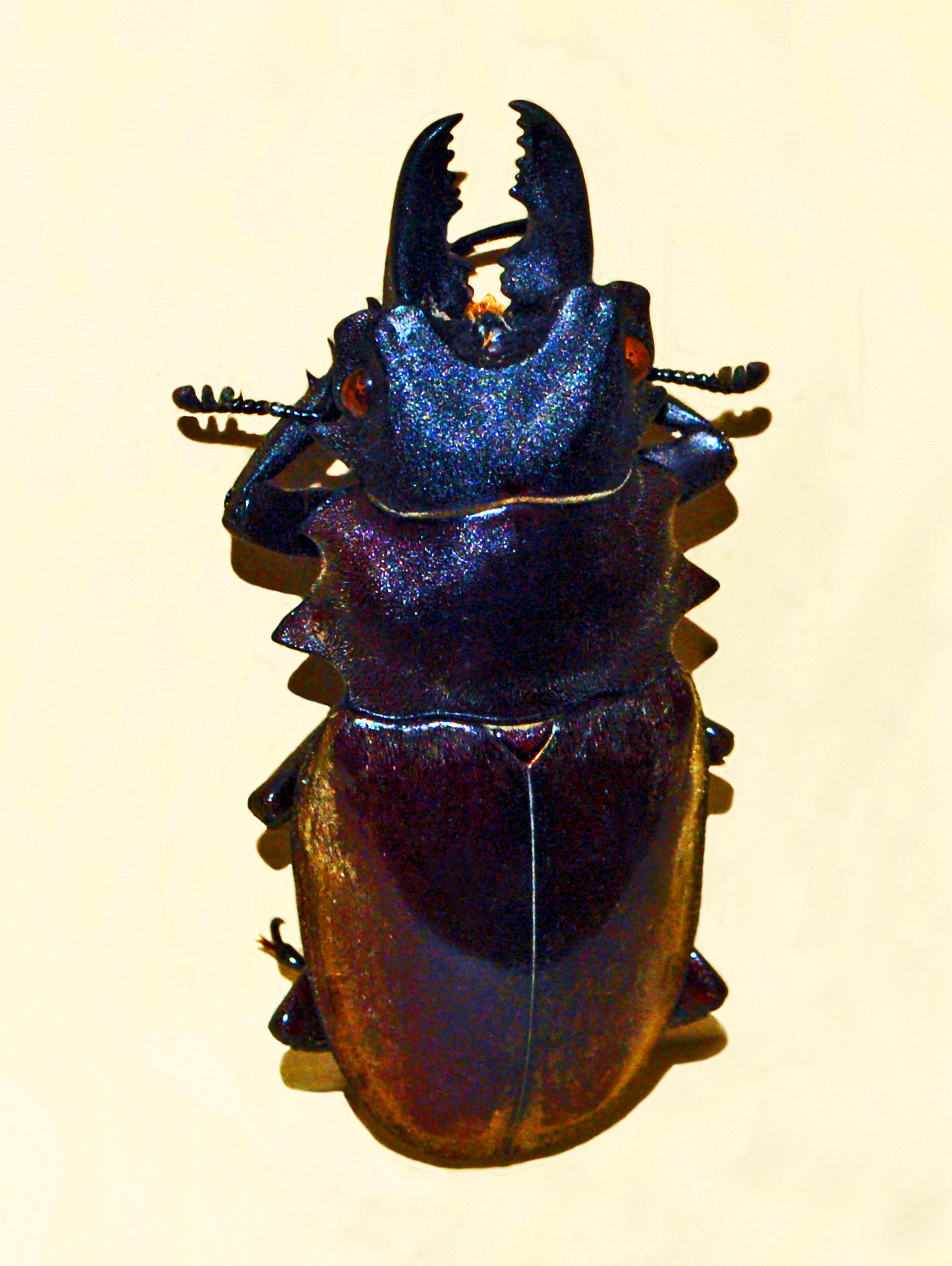 Odontolabis dalmani from Sumatra